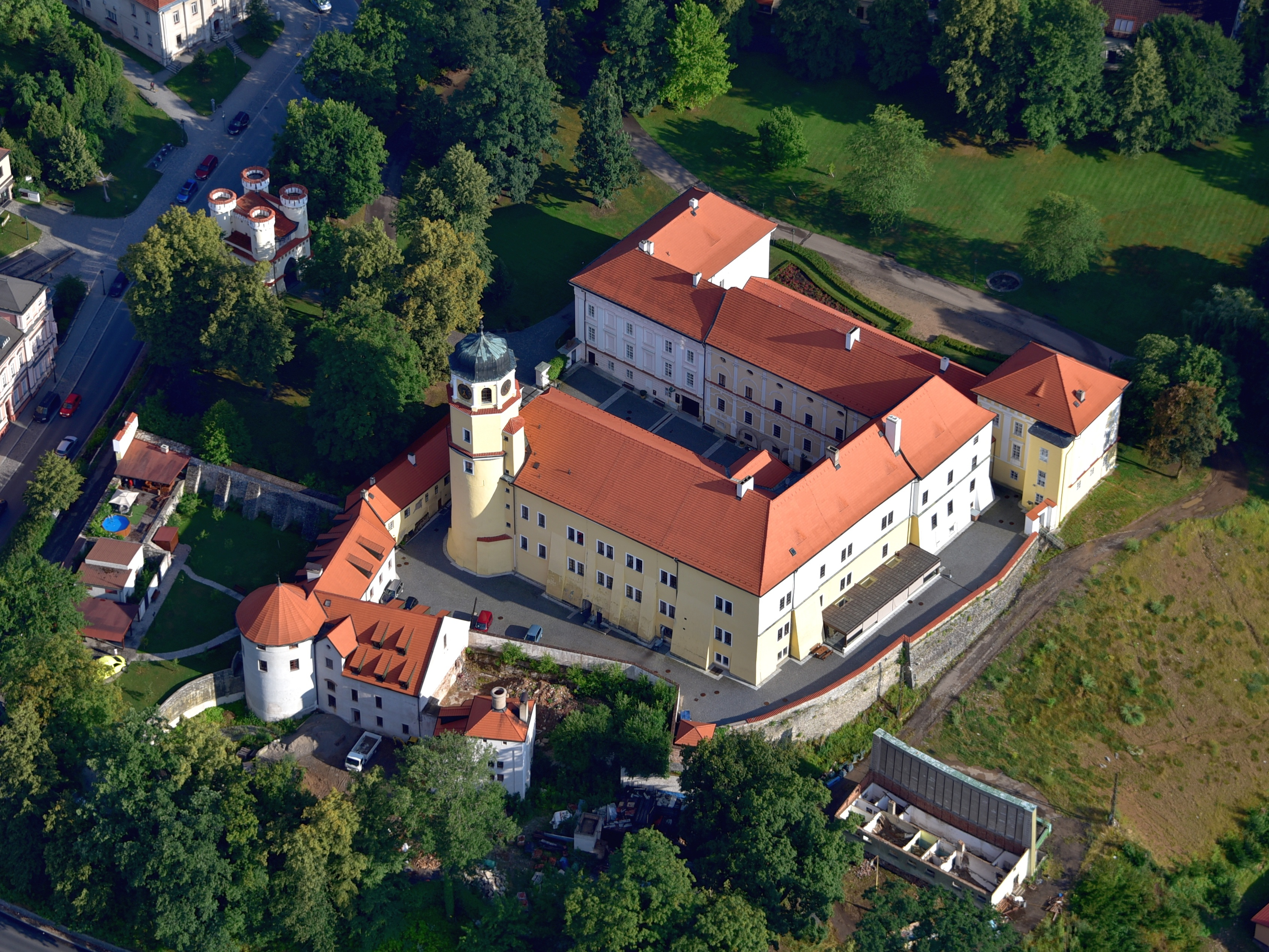 CZ - Schloss Vlašim, Luftaufnahme (2018)